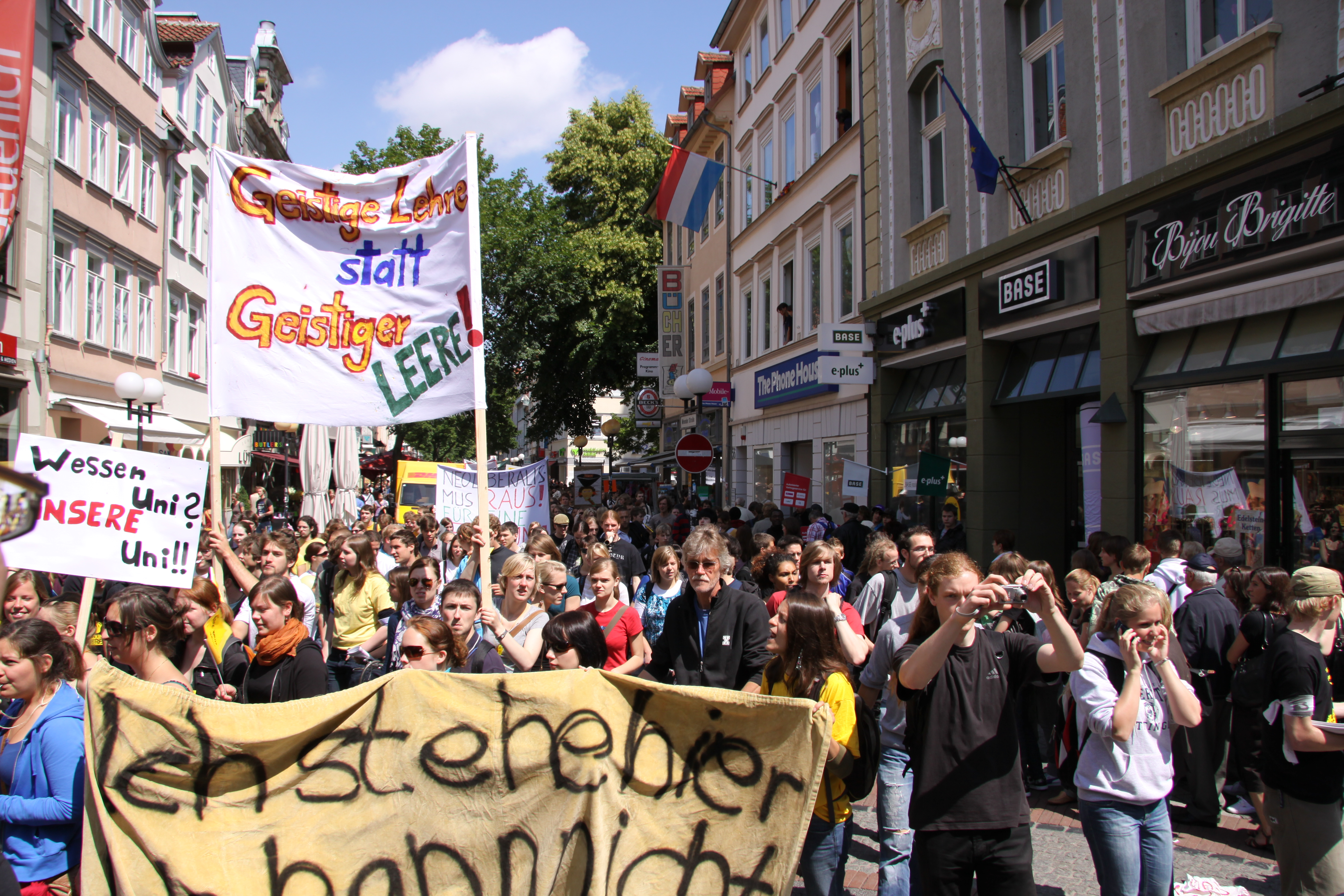 Teilnehmer der großen Demonstration beim Bundesweiten Bildungsstreiks 2009 in Göttingen.